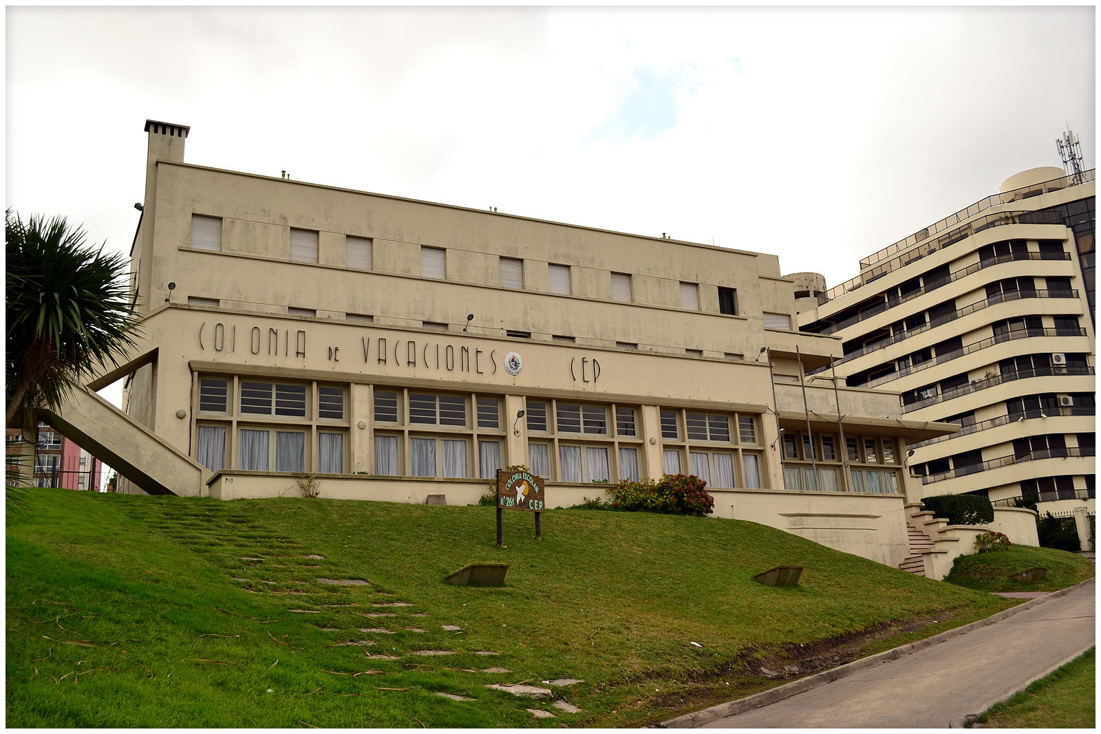 Colonia de Vacaciones de Malvín. La colonia de vacaciones muestra una organización espacial vinculada a las visuales donde las plantas se desarrollan según el lateral vidriado hacia la costa. El comedor se organiza paralelamente a la terraza siendo esta última una posibilidad de extensión. El segundo piso presenta un balconeo hacia la doble altura por medio de huecos que iluminan el pasillo de vinculo entre el lobby y los espacios de uso múltiples. Tanto en el comedor como en sus espacios adyacentes se percibe una estructura independiente a los muros aportando una importante presencia a las columnas, que a su vez permiten desarrollar una fachada libre destacando el elemento vidriado y el efecto que este genera en contraposición con el volumen del edificio. En las plantas superiores se encuentra el área de habitaciones con dos núcleos de escaleras siendo uno el principal con vistas hacia la costa e iluminación natural. La resolución funcional de estas plantas se hace evidente gracias a la correcta disposición de las habitaciones respondiendo a las exigencias de estética y confort planteadas por el arquitecto. En este sentido se muestra una gran preocupación por la calidad espacial y funcional de las habitaciones donde se plantea un área de servicio contra el pasillo correspondiente a los baños para poder lograr mayor área con vista a la costa. Arq. Alberto Muñoz del Campo, 1936 Crédito: Universidad ORT (